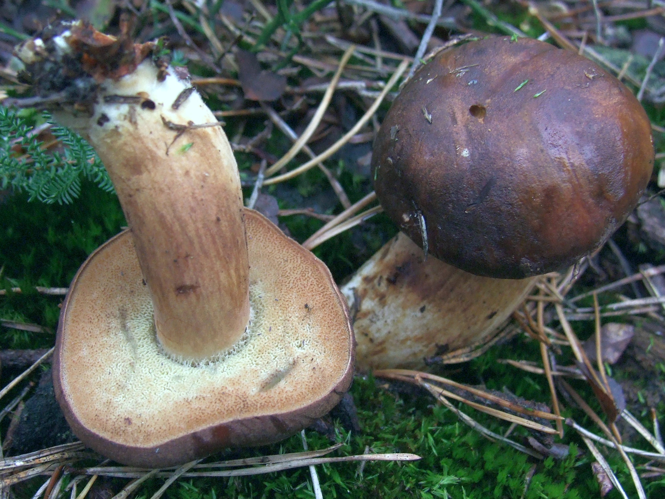 Boletus badius